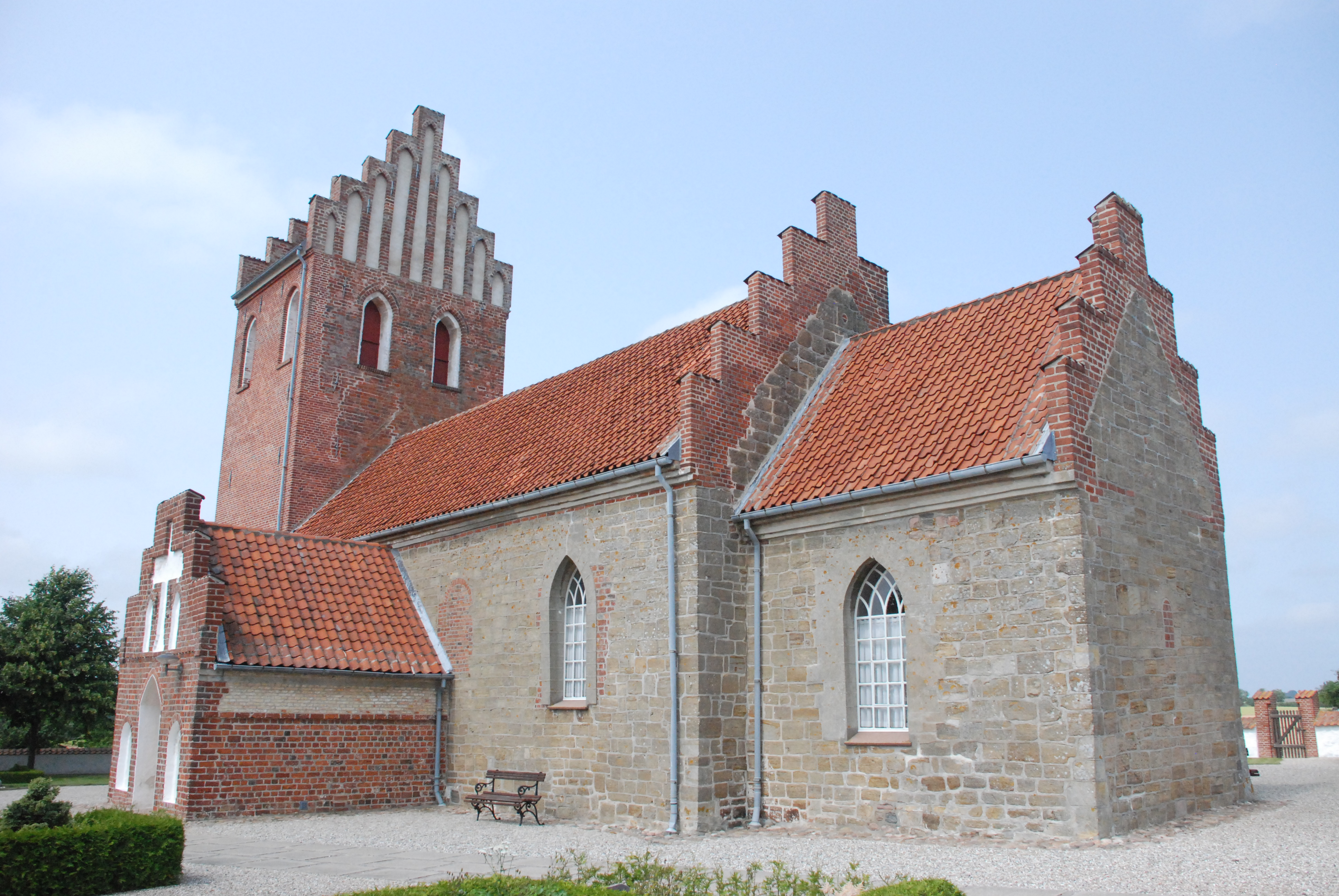 Valby Kirke, Valby Sogn, Holbo Herred, Frederiksborg Amt, Danmark.